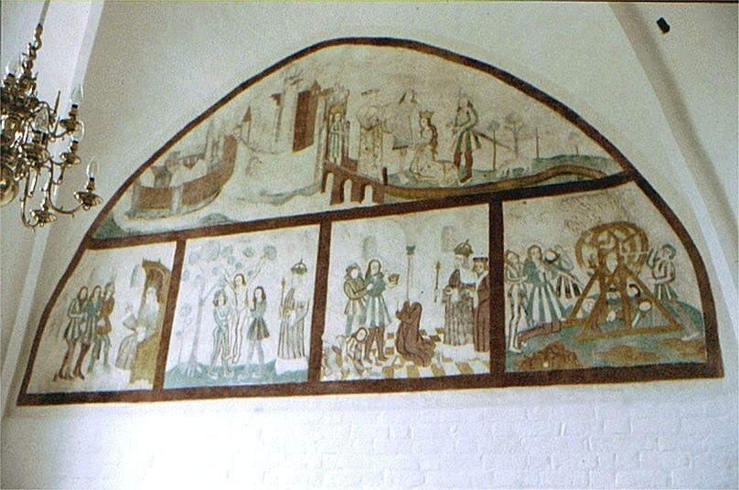 Broager Kirke.